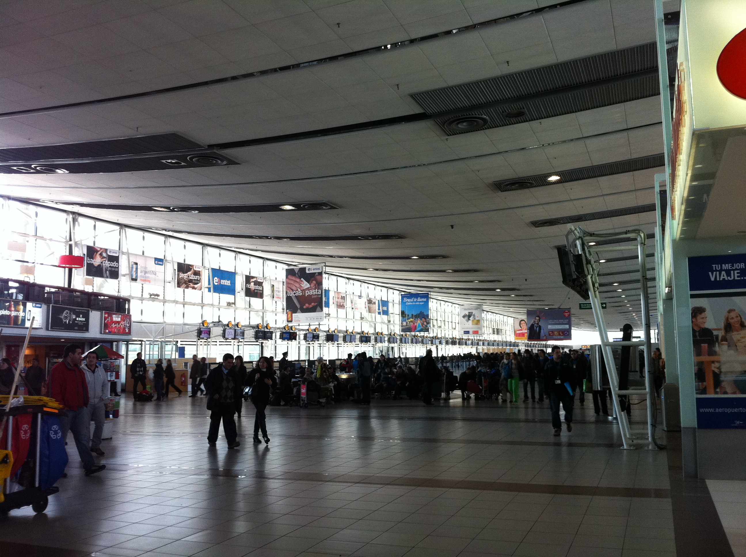 Indoor Santiago Airport - Arturo Merino Benitez (SCL)